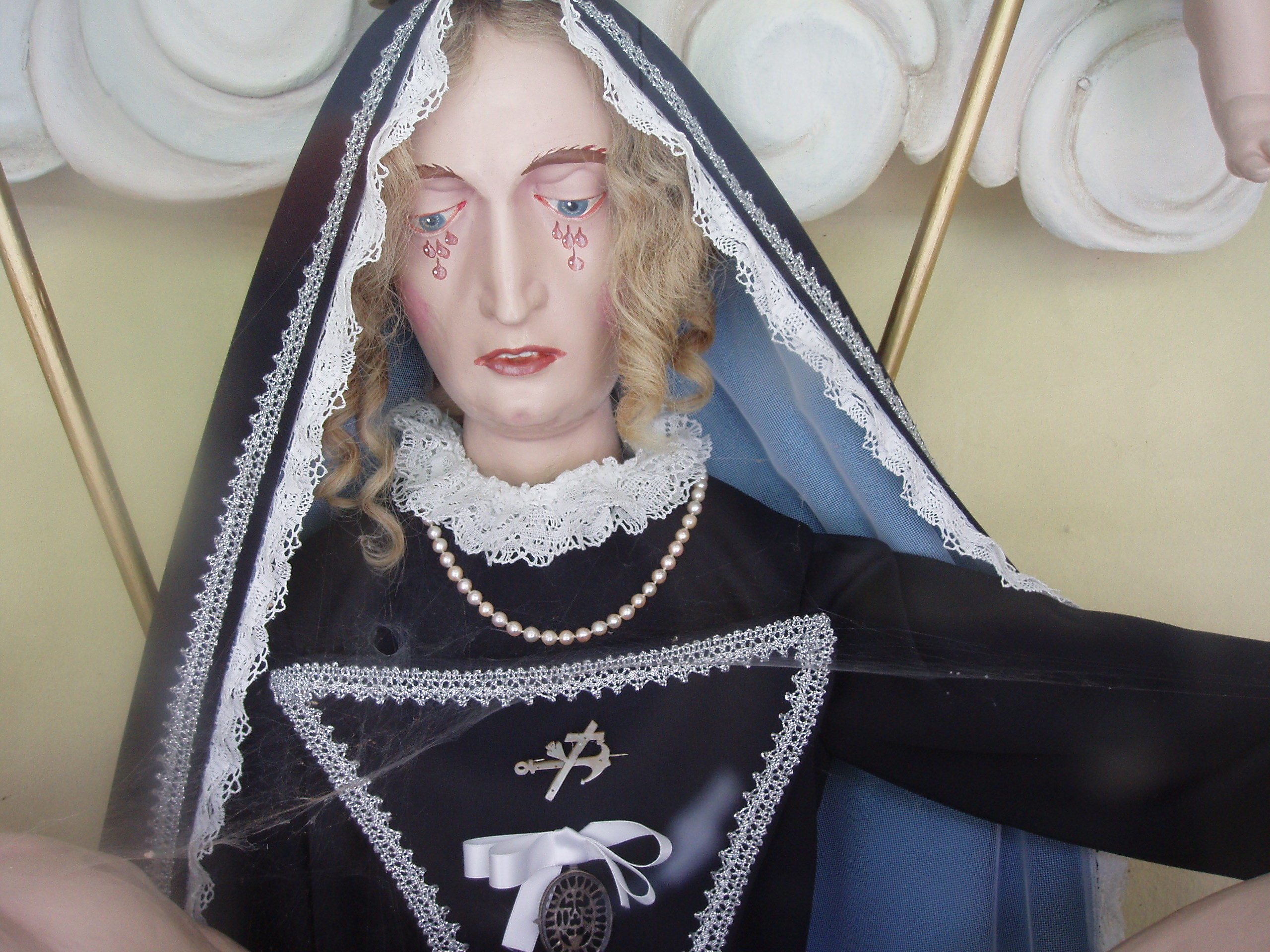 barocke Maria in der Wegkapelle zwischen Bad Oberdorf und Bad Hindelang